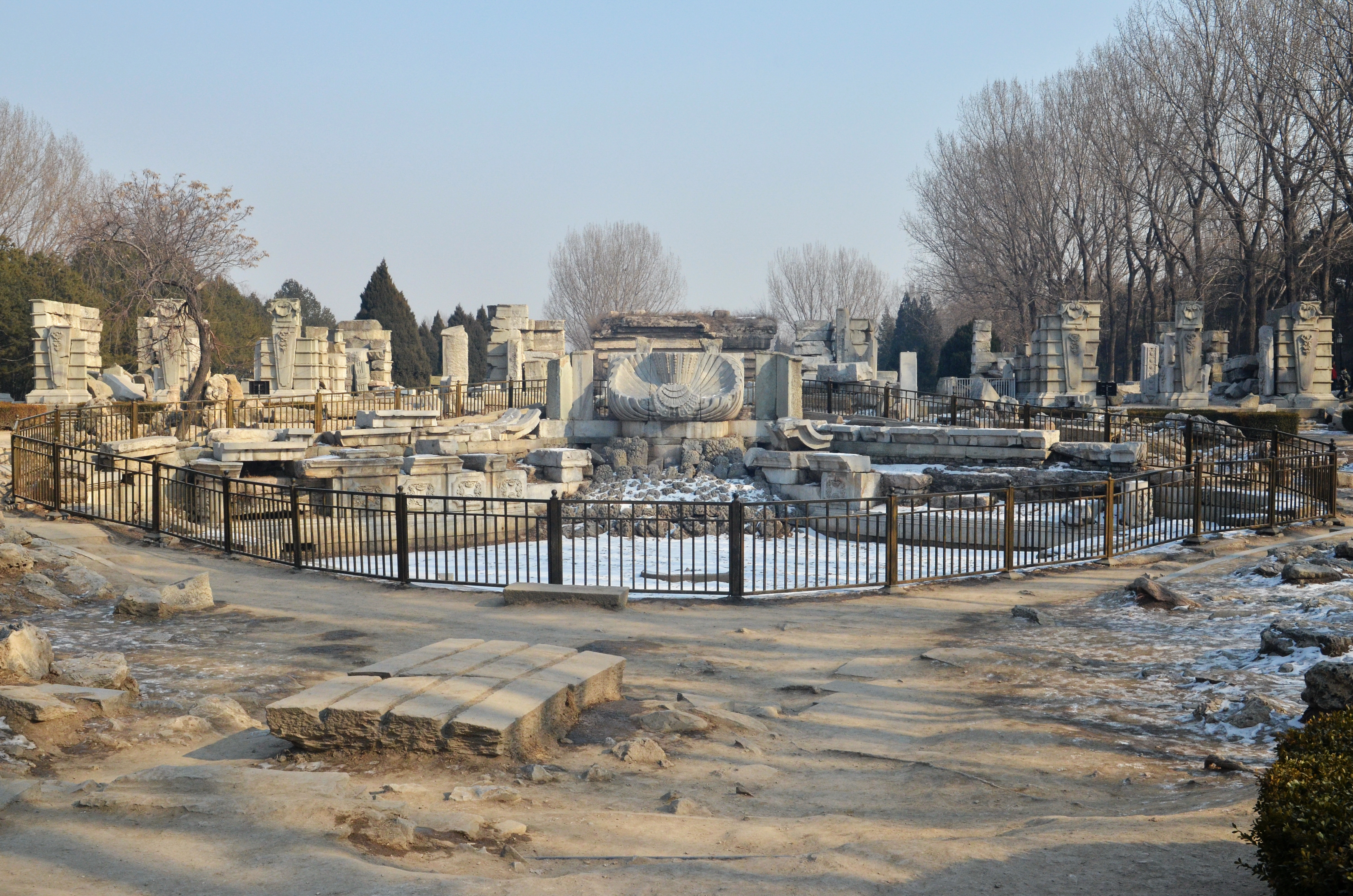 中文（中国大陆）: 海晏堂遗址正面，楼前左右弧形石阶环抱喷水池，是十二生肖人身兽首像所在地。